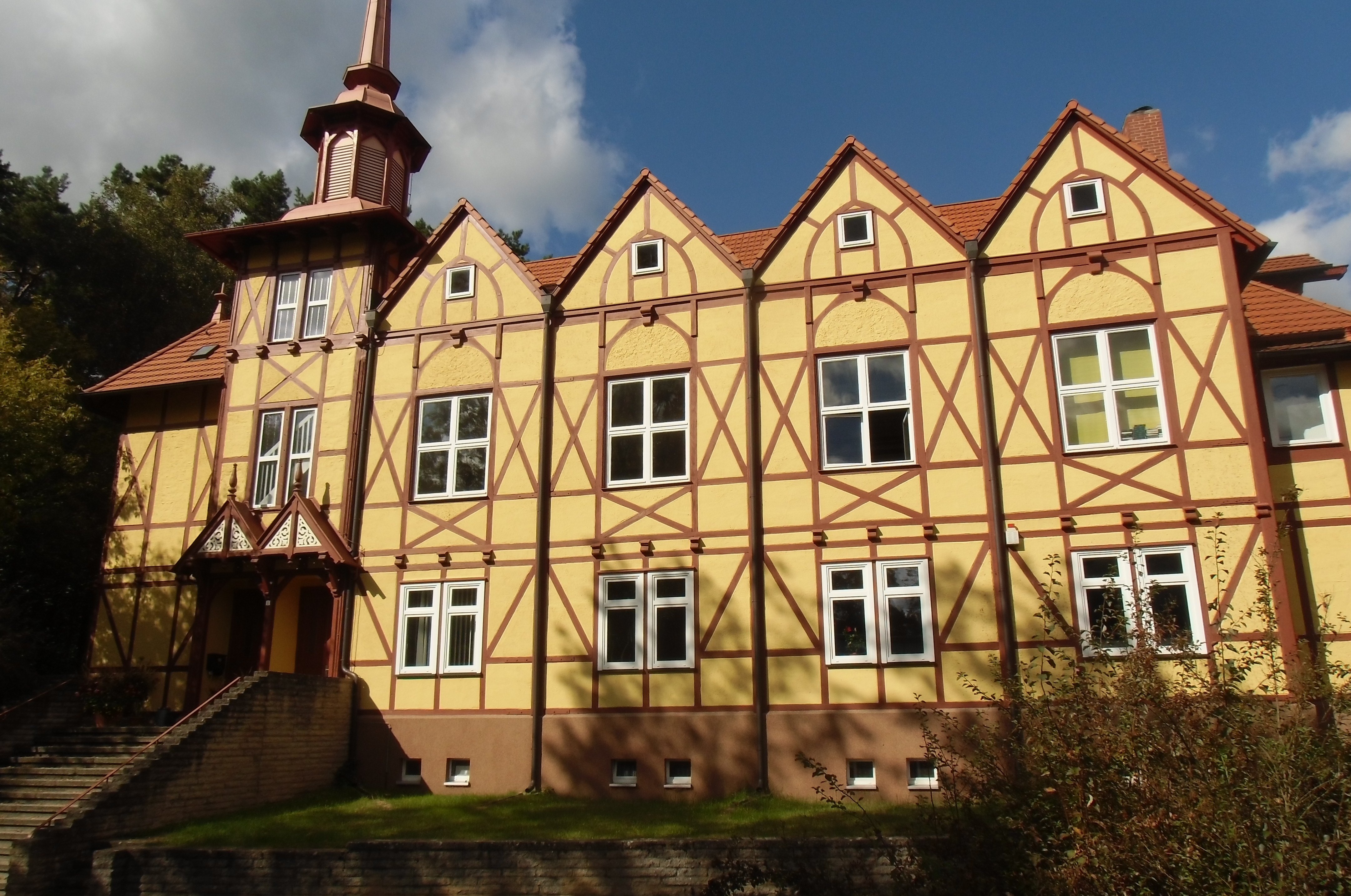 Begegnungs- und Verwaltunszentrum der 1906 durch Friedrich von Bodelschwingh den Älteren gegründeten Hoffnungstaler Anstalten Lobetal